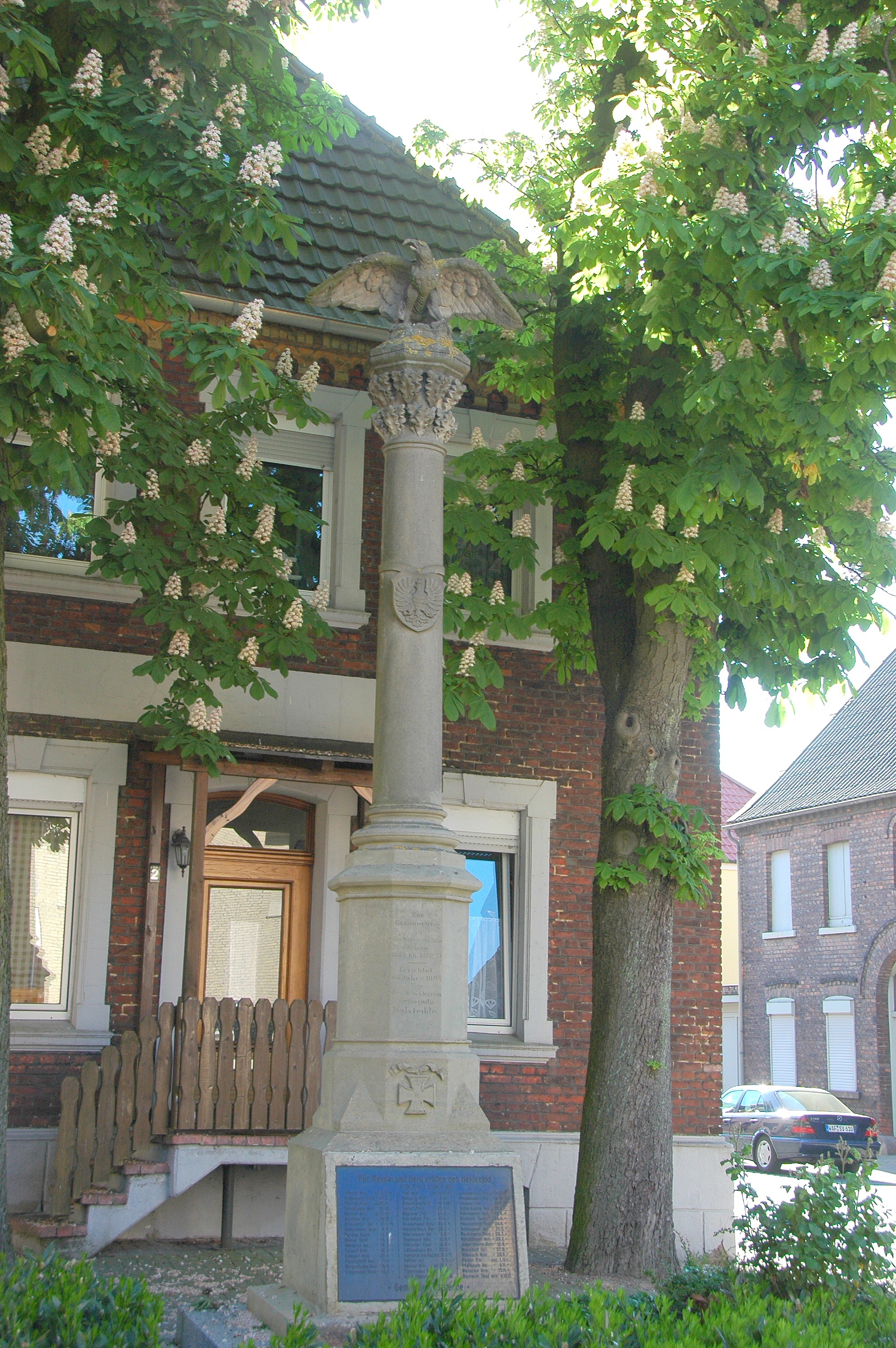 Walstedde, Kriegerdenkal zu den Einigungskriegen, mit Gedenktafel für die aus dem Ort stammenden im 1. Weltkrieg gefallenen Soldaten